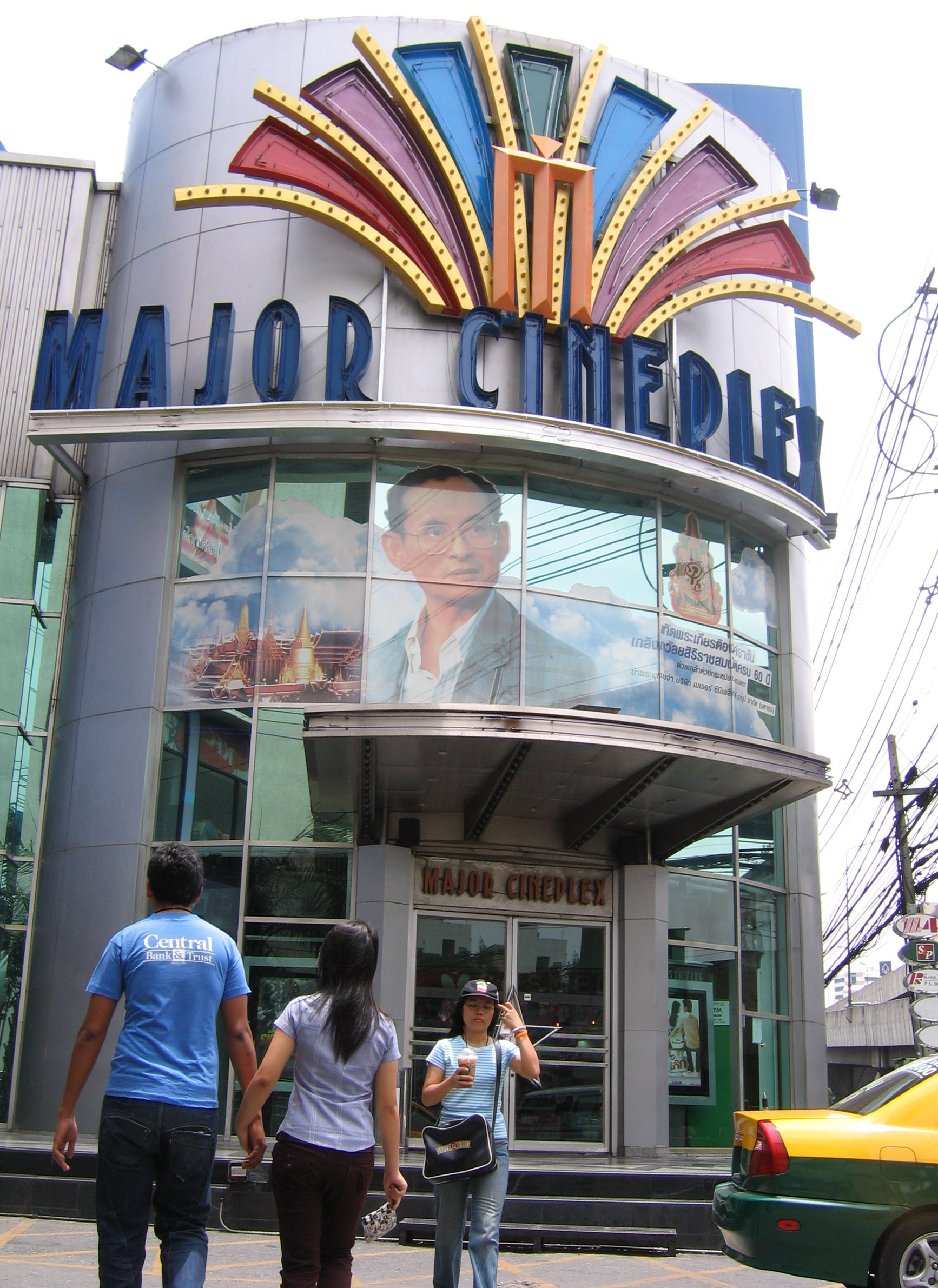 A cinema in Bangkok, Major Cineplex Ramkamhaeng.